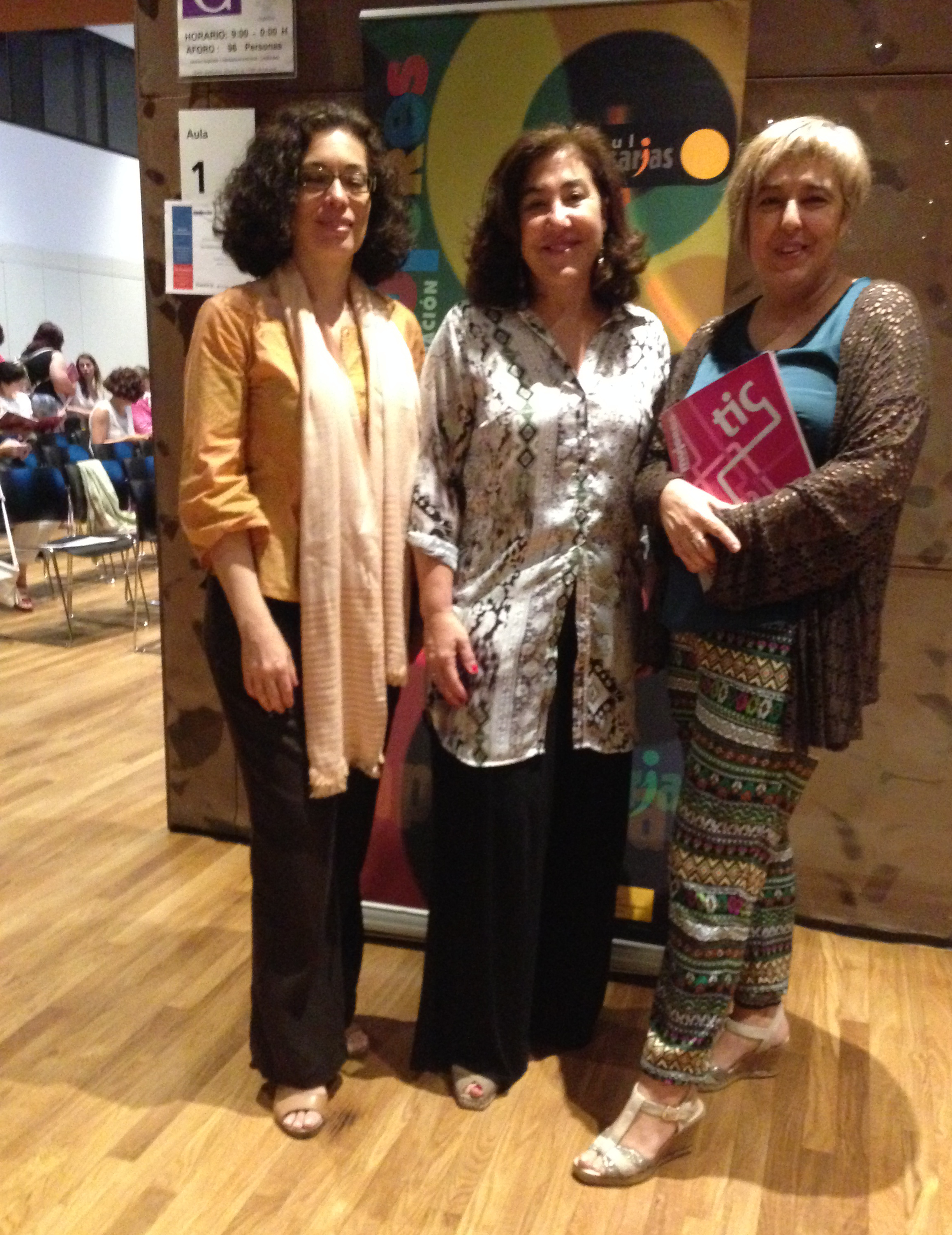 Marisa Soleto, Almudena Solo de Zaldivar (Caixabank) y Cristina García Comas en el IX Encuentro de Emprendedoras y Empresarias organizado en CaixaForum por Fundación Mujeres en Madrid. Junio 2015